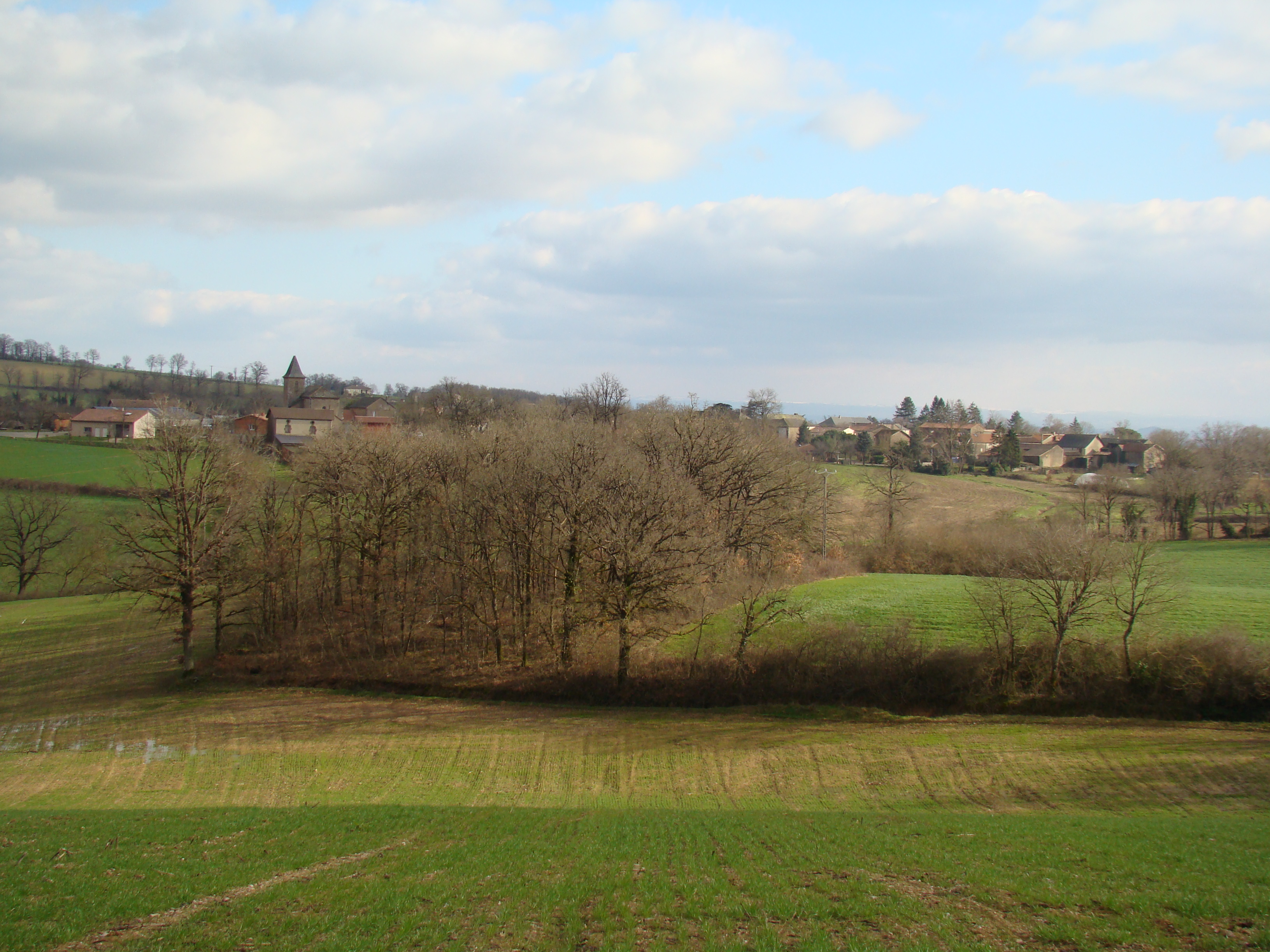 Le village vu de la route de Saint-Christophe